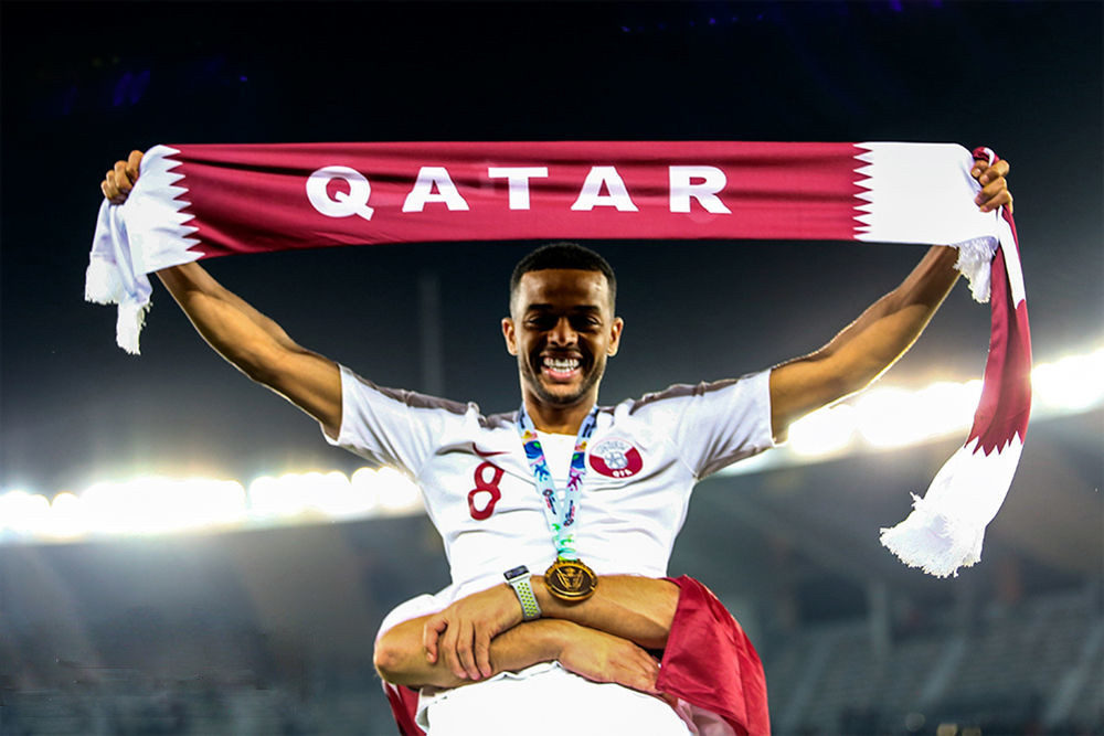 فینال جام ملت های آسیا ۲۰۱۹ - دیدار قطر و ژاپن دیدار تیم های ملی فوتبال قطر و ژاپن در مرحله نهایی هفدهمین دوره جام ملت های آسیا ۲۰۱۹ امارات ، با برتری ۳ بر یک قطر در ورزشگاه بن زاید شهر ابوظبی بر